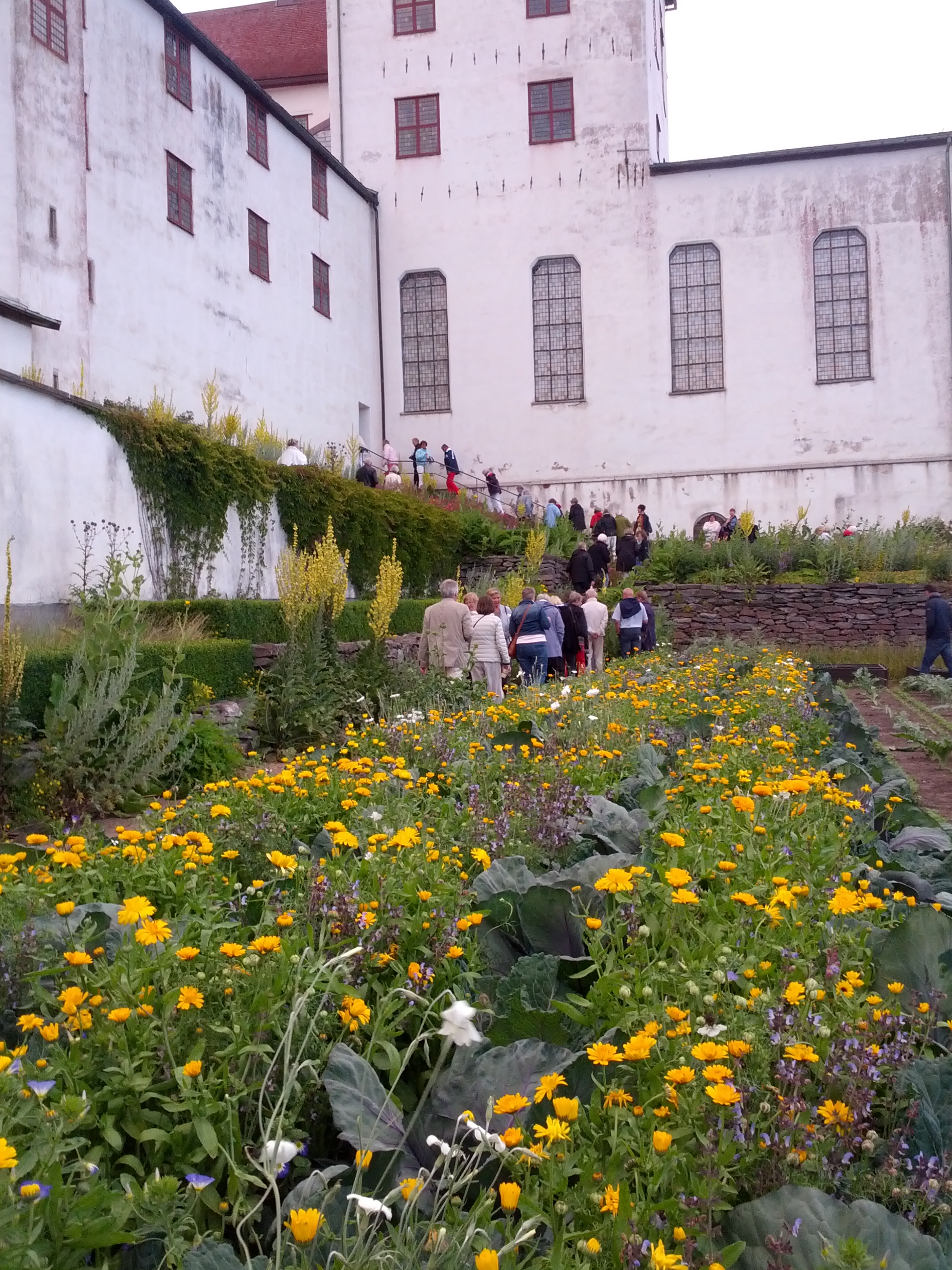 Bild från en av pauserna under en föreställning under läcköoperan Beatrice & Benedict.